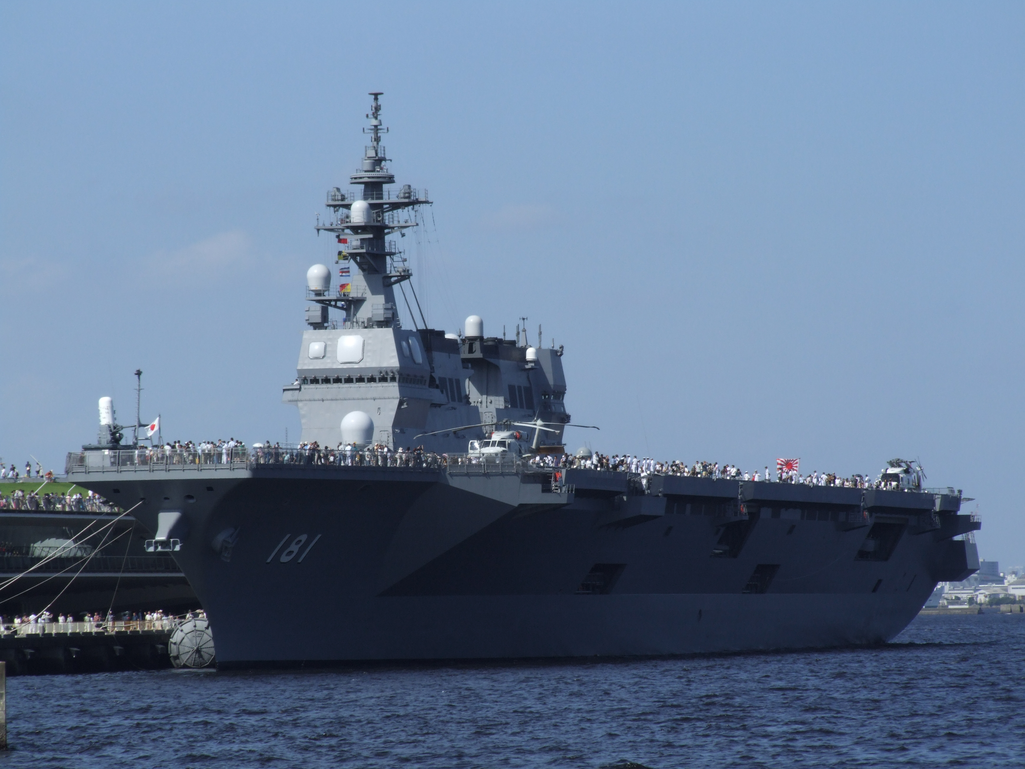 横浜・大桟橋に停泊中の護衛艦ひゅうが。